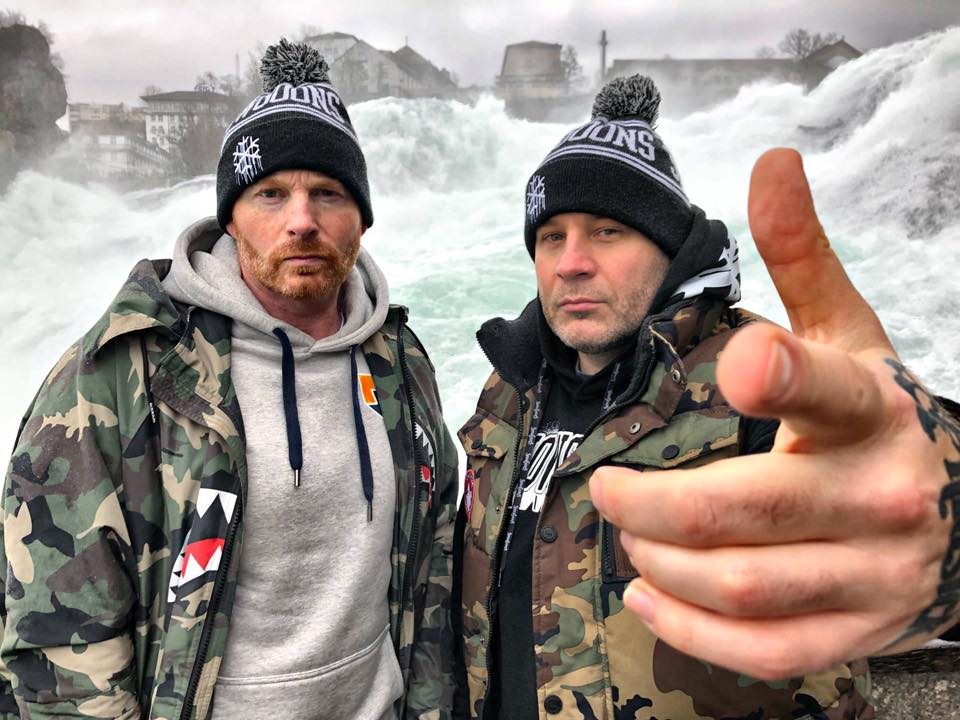 Snowgoons